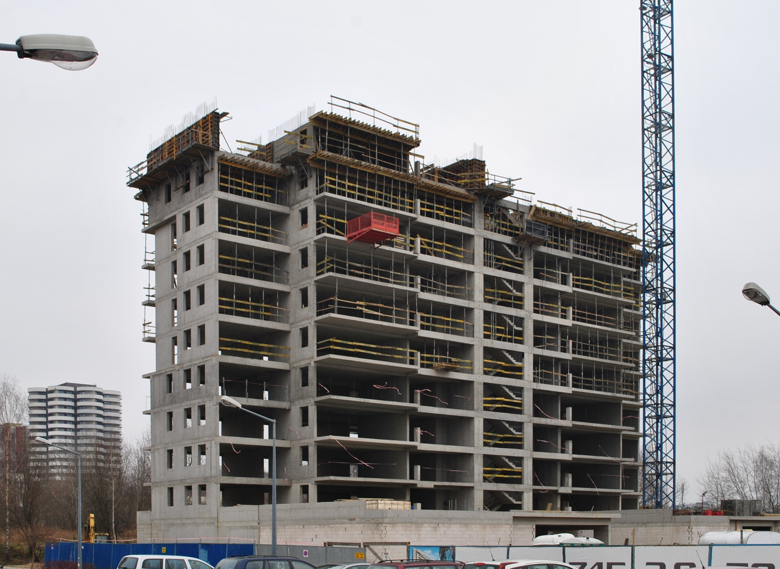 Katowice, Osiedle Tysiąclecia. Budowa wieżowca na osiedlu Nowe Tysiąclecie